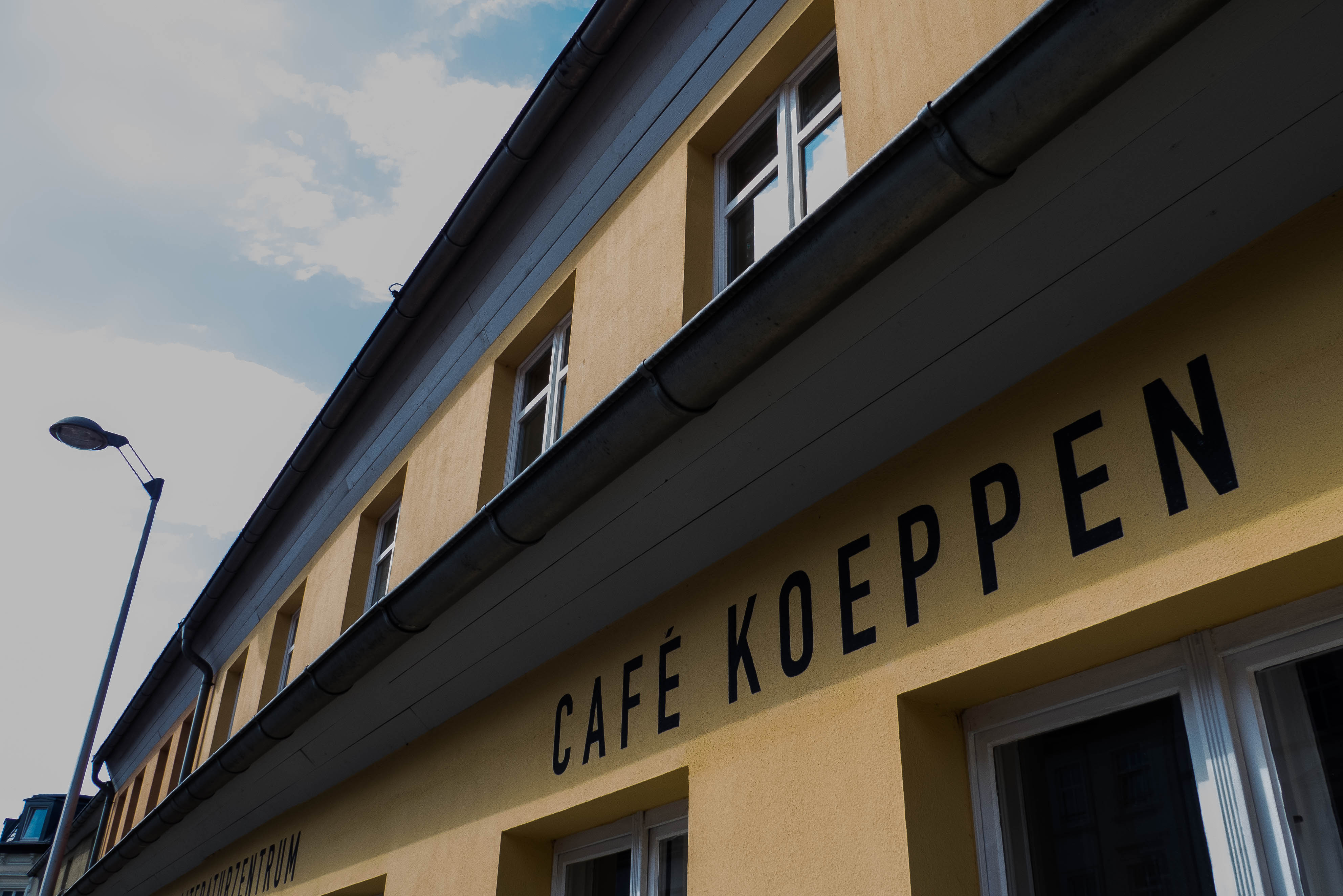 Geburtshaus Wolfgang Koeppen, Bahnhofstr. 4 in Greifswald